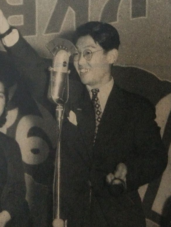 秦豊